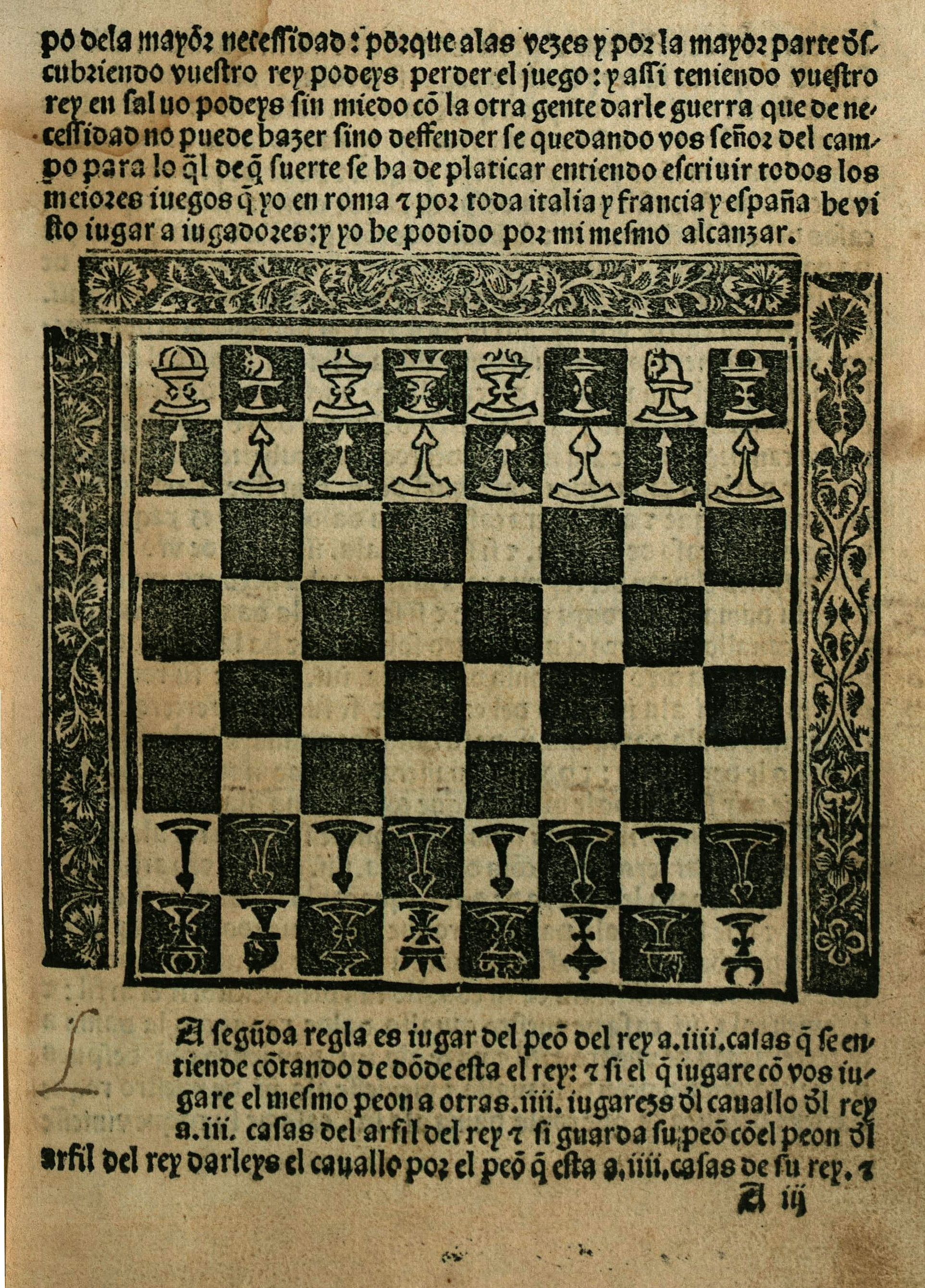 Diagrama de la obra de Luis Ramírez de Lucena, Repetición de amores y Arte de ajedrez, Salamanca, Leonardo Hutz y Lope Sanz, circa 1496.